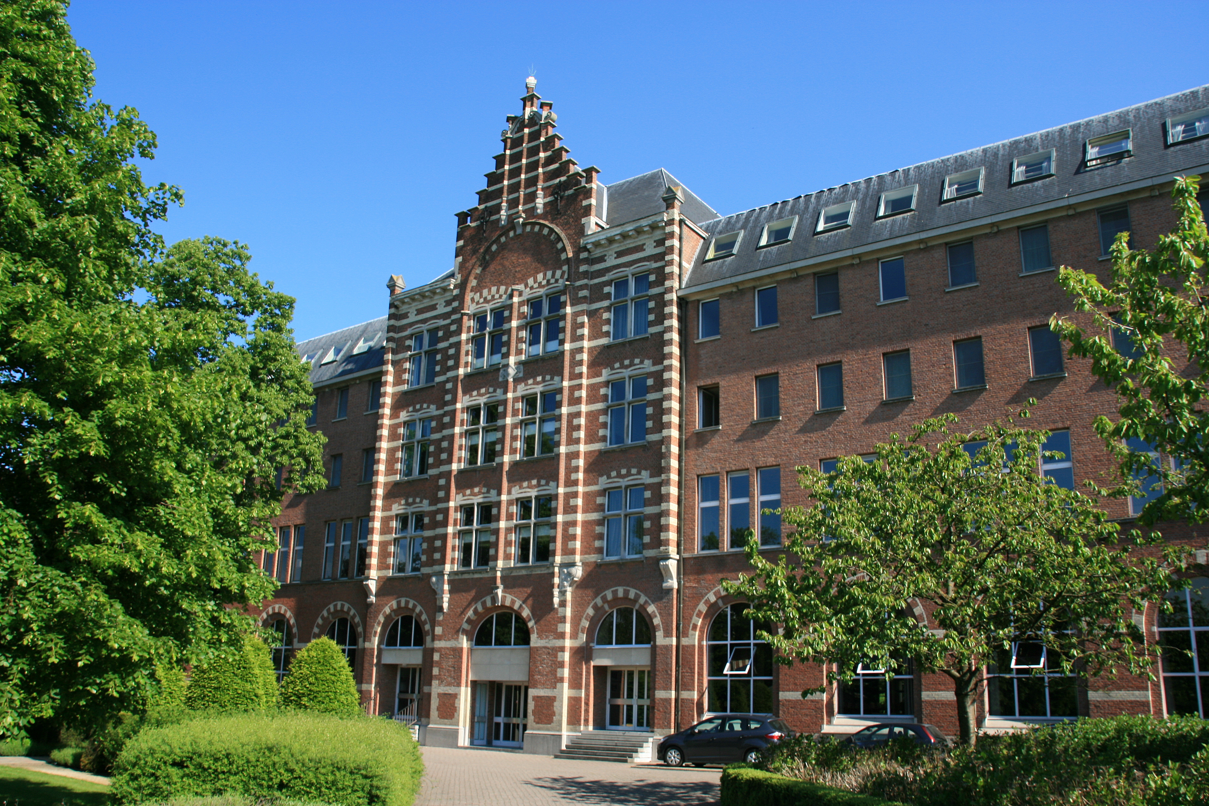 Het Klein Seminarie is een katholieke school voor zowel kleuter- als lager en secundair onderwijs. Het werd opgericht in 1834 door toenmalig pastoor Cauwenbergh als Aartsbisschoppelijk College, van bij aanvang met een verplicht internaat, en enkel voor jongens. In 1837 werd het college omgevormd tot Eerste afdeling van het Aartsbischoppelijk Seminarie door aartsbisschop Sterckx, en kreeg de school ook de naam Klein Seminarie, tot in de jaren 1950 ook bijgenaamd het Kempisch "pastoorsfabriekske".